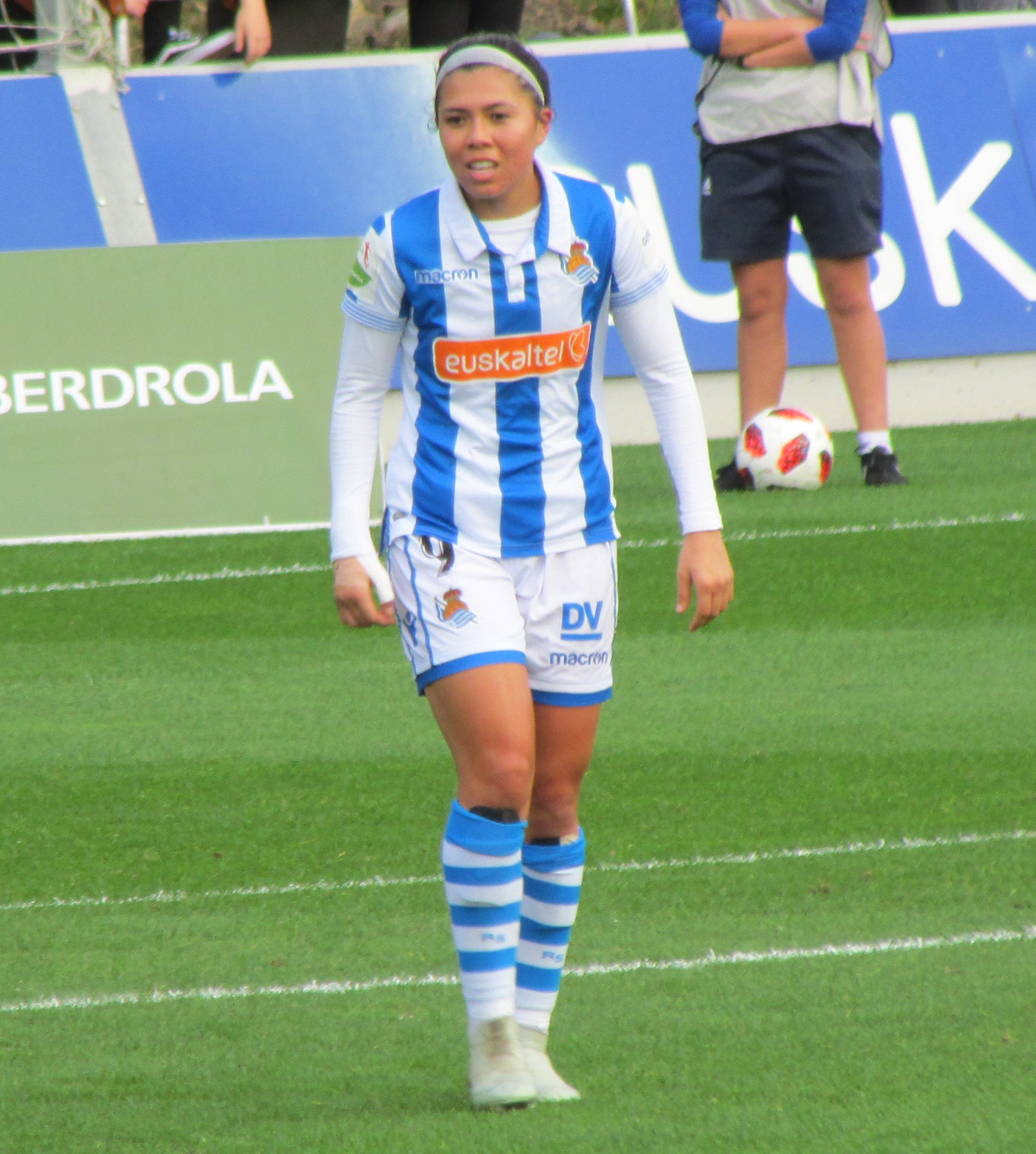 Futbolista de la Real Sociedad